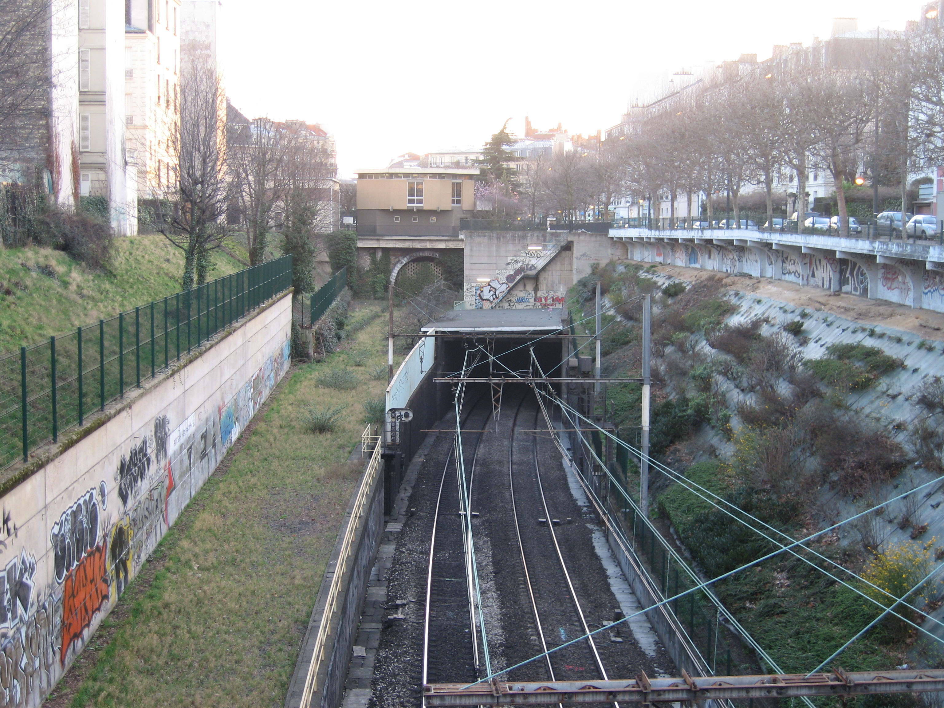 Début du tunnel du RER A à l'est, entre Nation et Vincennes (vers l'ouest, ie Nation). On peut voir à gauche le tunnel condamné de la ligne de Vincennes et la plateforme d'accès déferrée. (Position GPS : 48.844345, 2.420447)